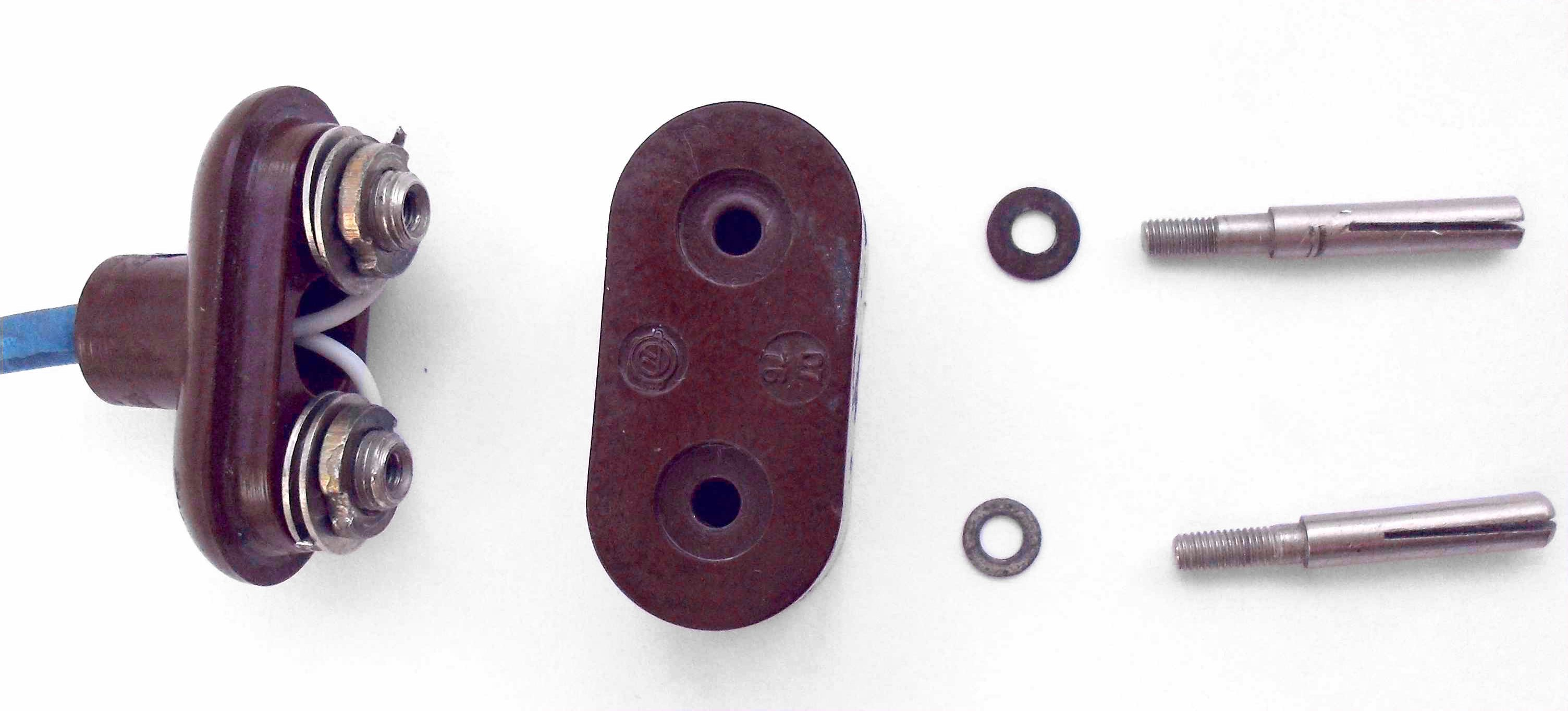 Детали советской штепсельной вилки с разрезными штифтами